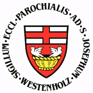 Siegel der katholischen Kirchengemeinde Sankt Joseph zu Westenholz in Delbrück